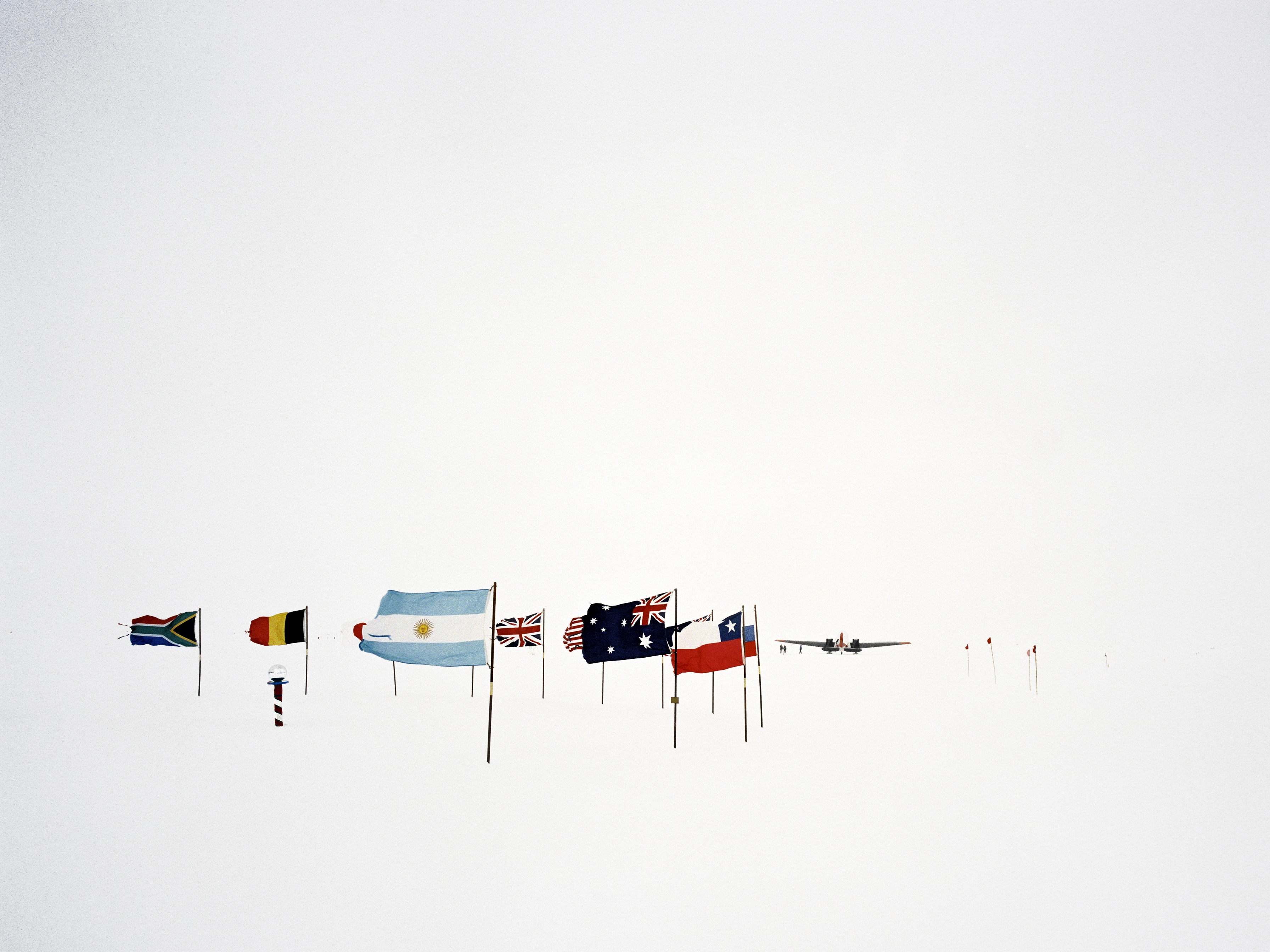 Mamiya 7II, Portra 400